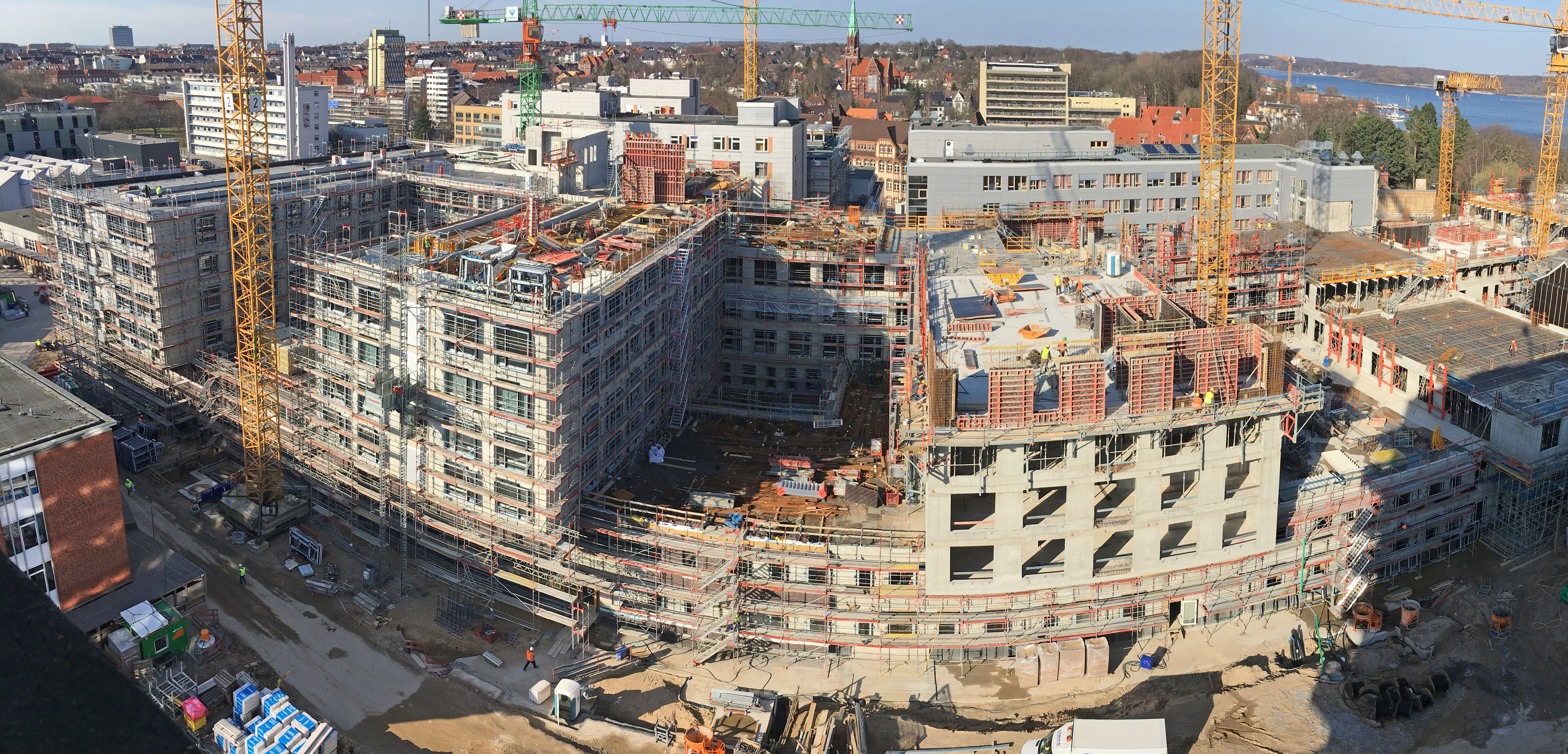 Zentralklinikum, Campus Kiel